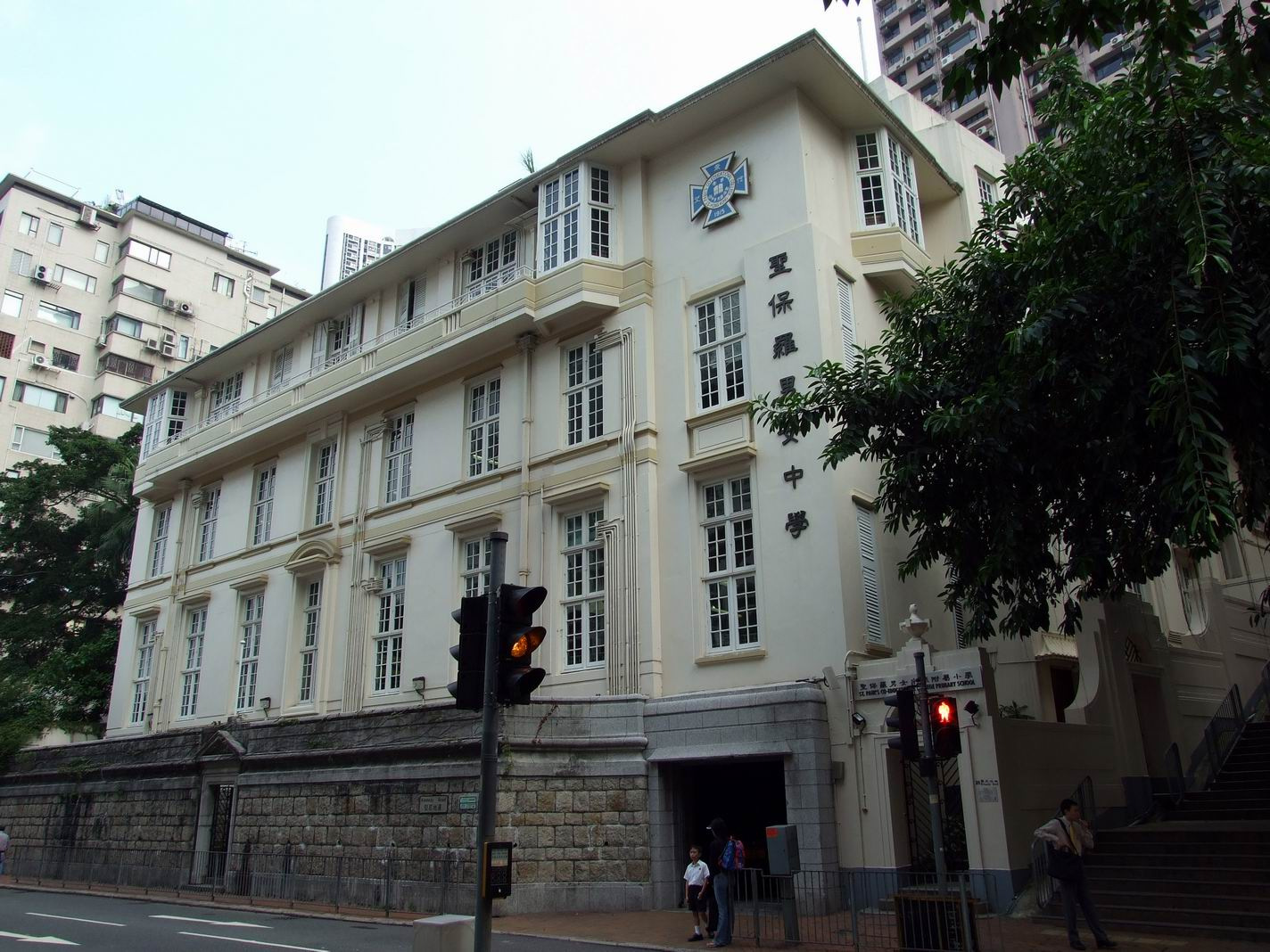 聖保羅男女中學